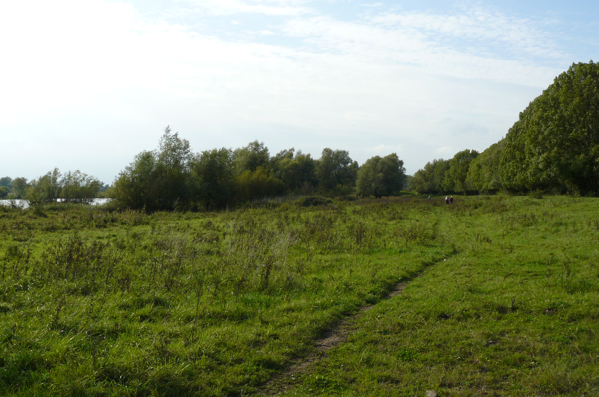 Munnikenland met rechts de dijk langs de Waal.